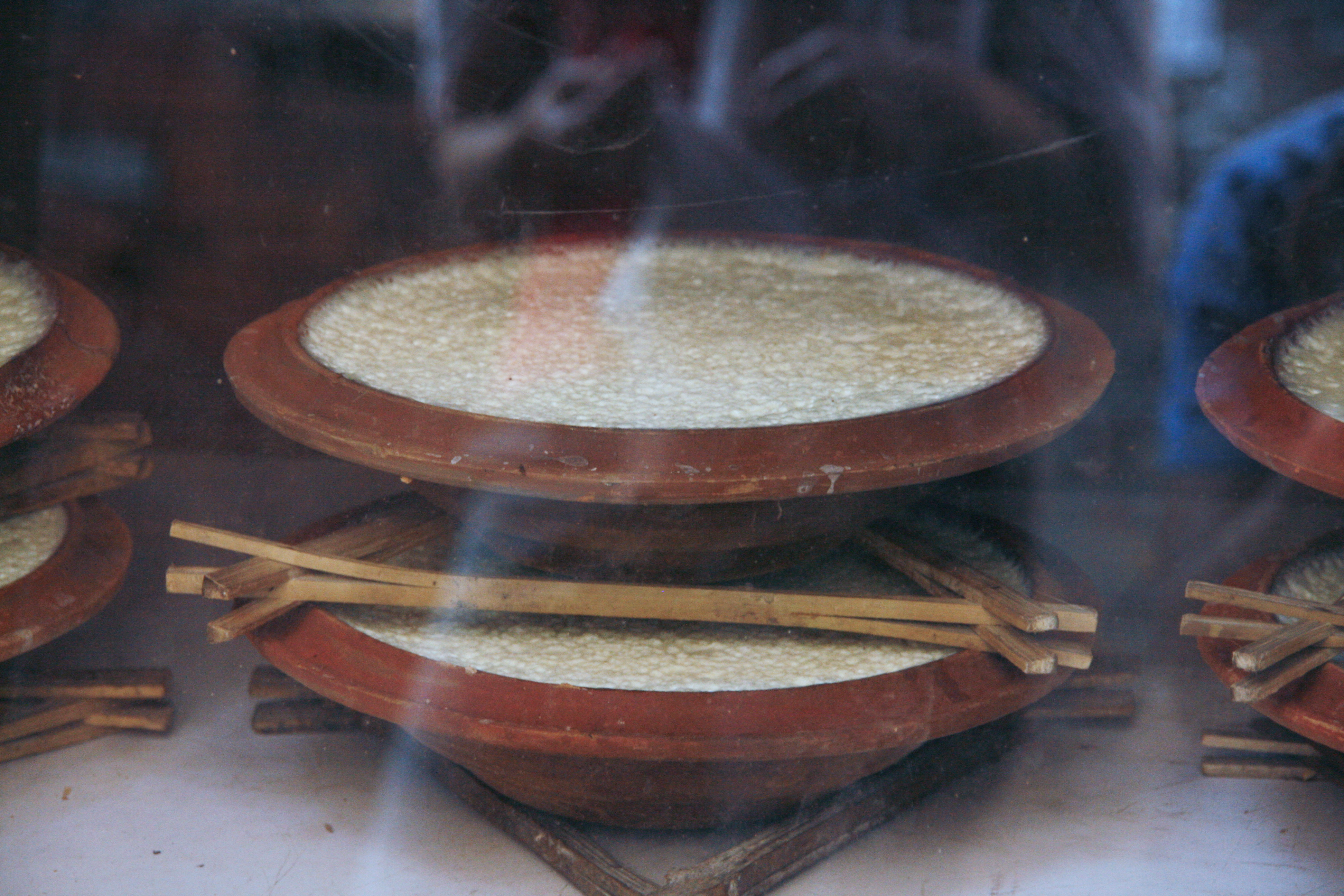 Nepali curd Bhaktapur, Katmandu